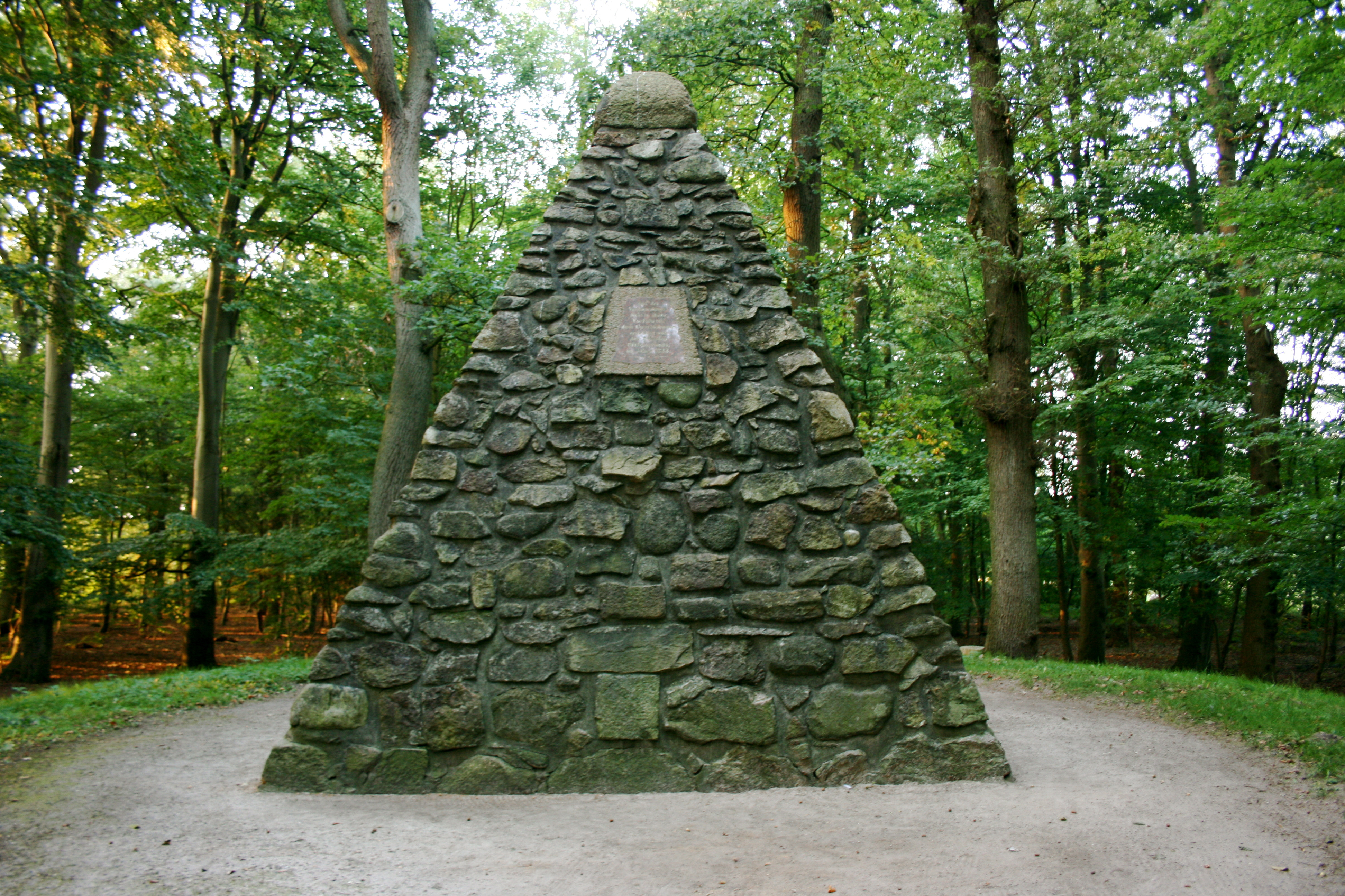 Upstallsboomdenkmal